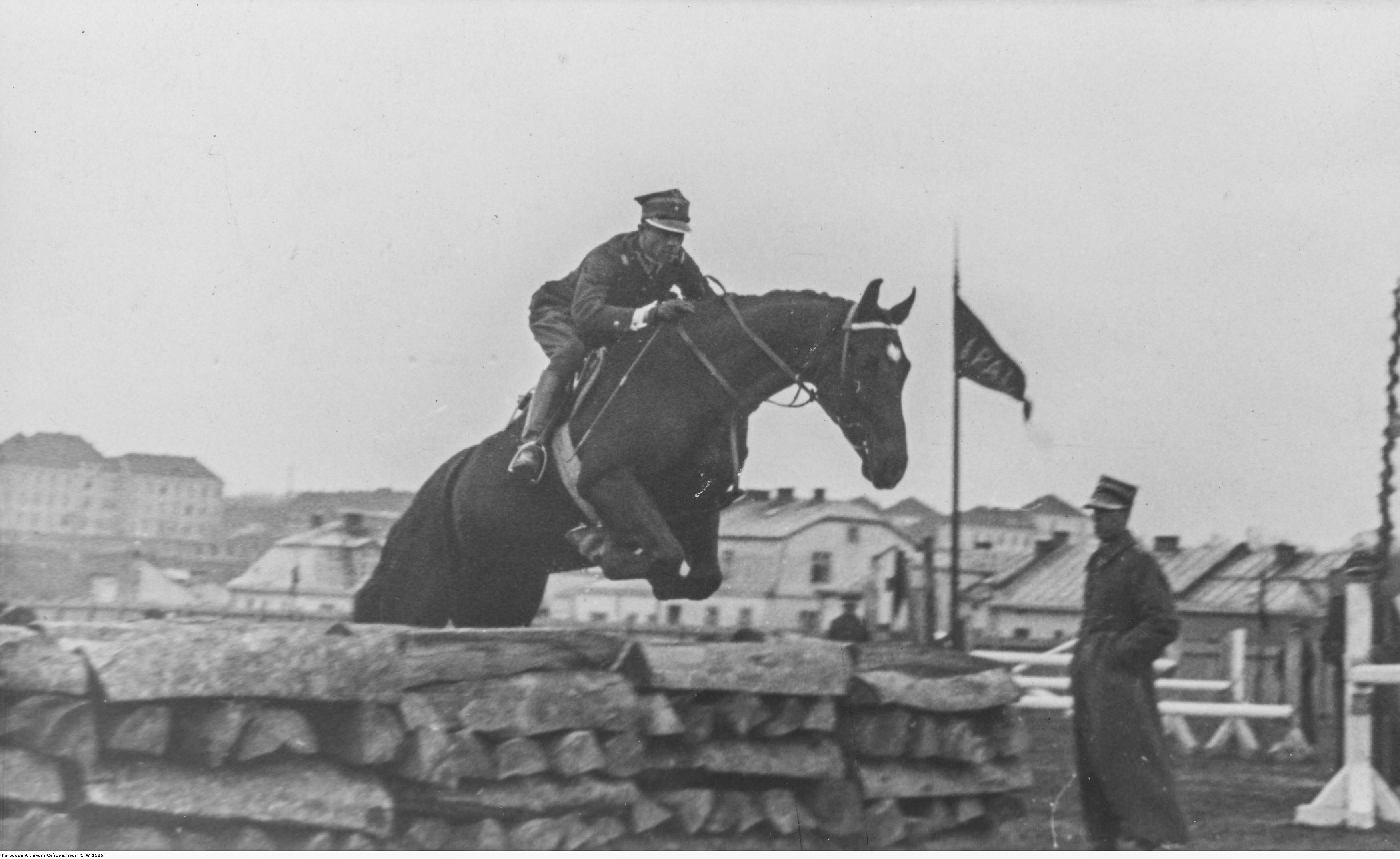 Zawody konne w 6 Pułku Artylerii Ciężkiej we Lwowie; kwiecień 1936 r. Przeszkodę pokonuje major Józef Trenkwald z 14 Pułku Ułanów Jazłowieckich na koniu "Czar". Koncern Ilustrowany Kurier Codzienny - Archiwum Ilustracji. Sygnatura: 1-W-1526